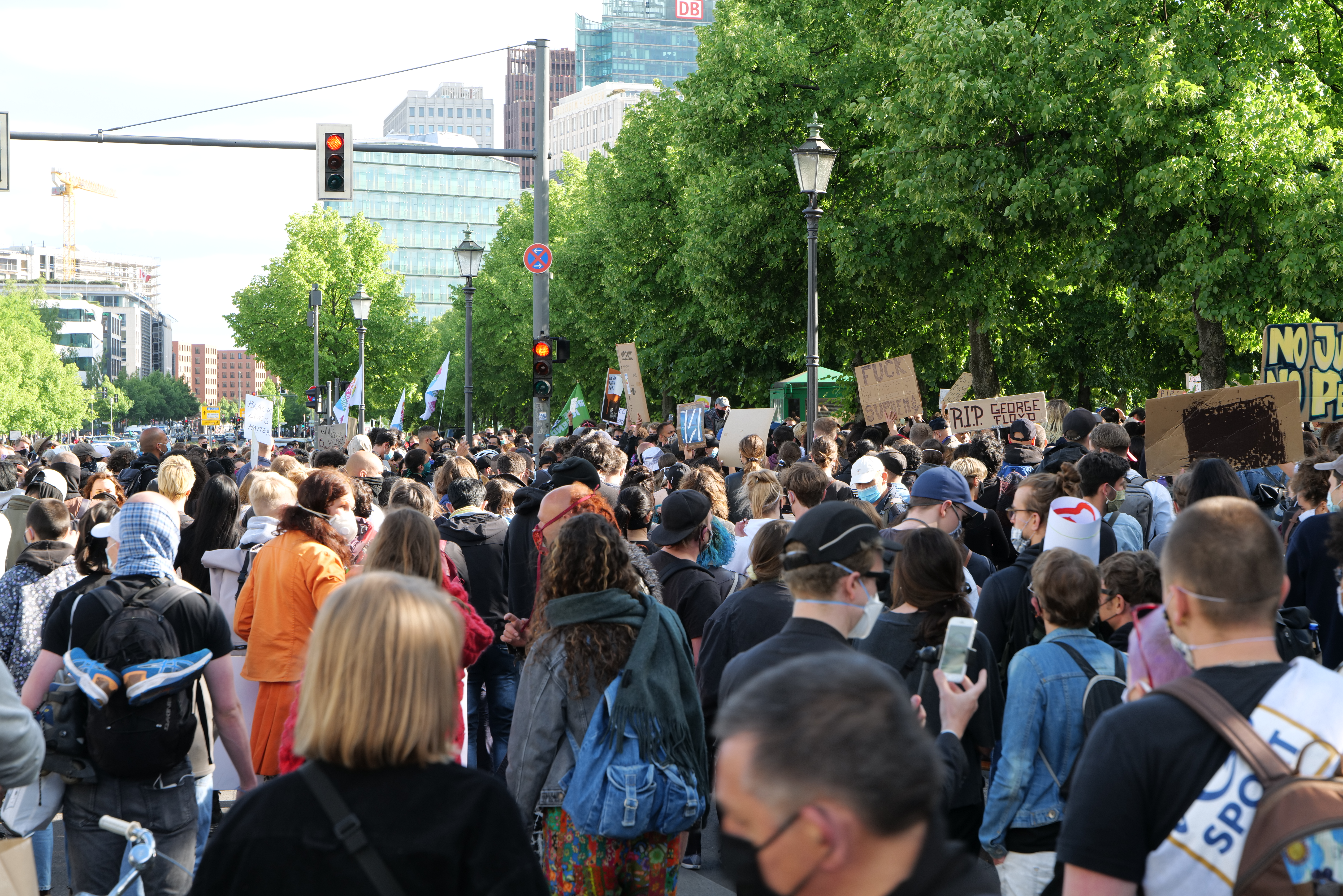 Kundgebung gegen Rassismus und Polizeigewalt an der Botschaft der USA in Berlin nach dem Mord an George Floyd durch einen Polizisten in den USA am 30. Mai 2020.